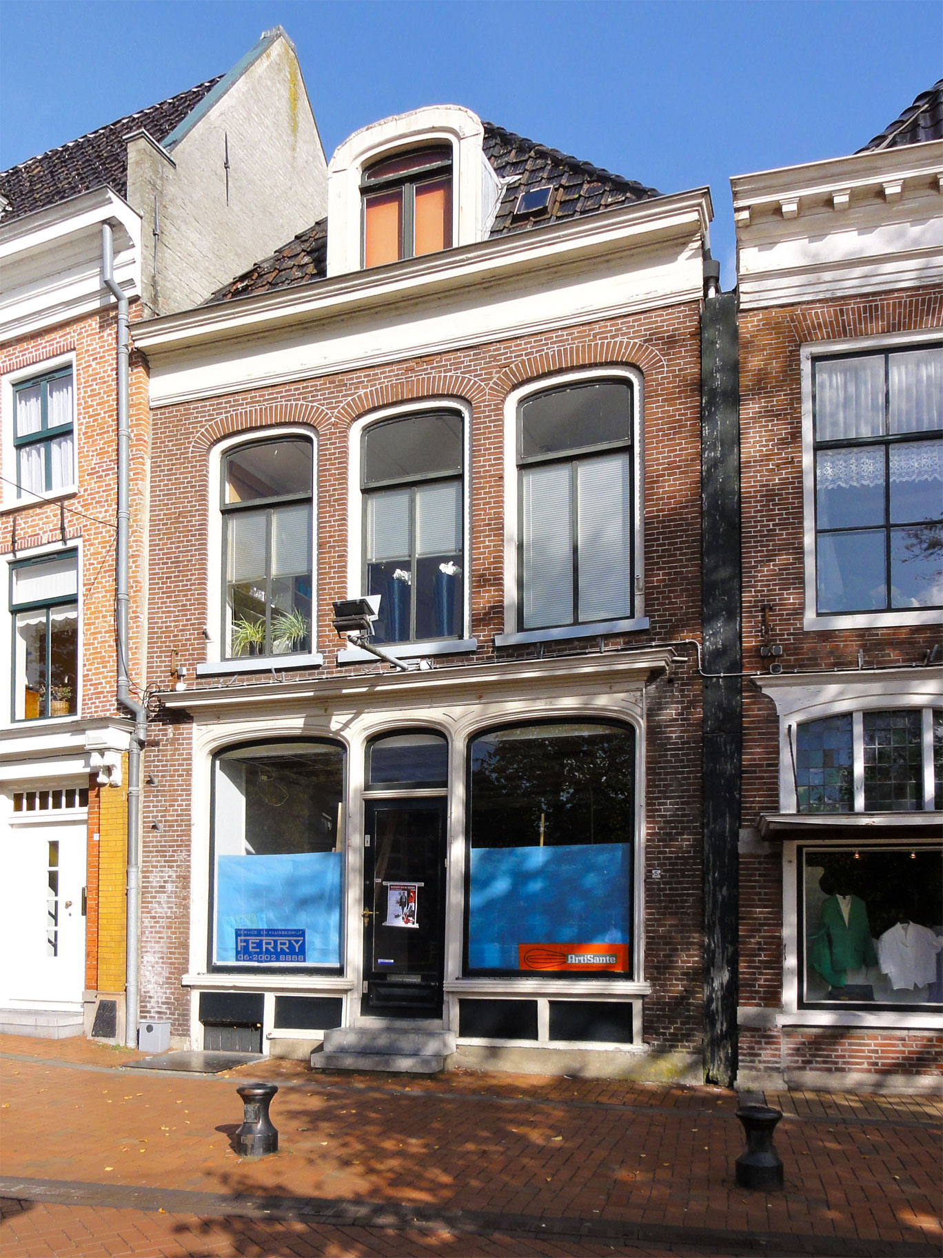 Diepswal 5 Dokkum. rijksmonument